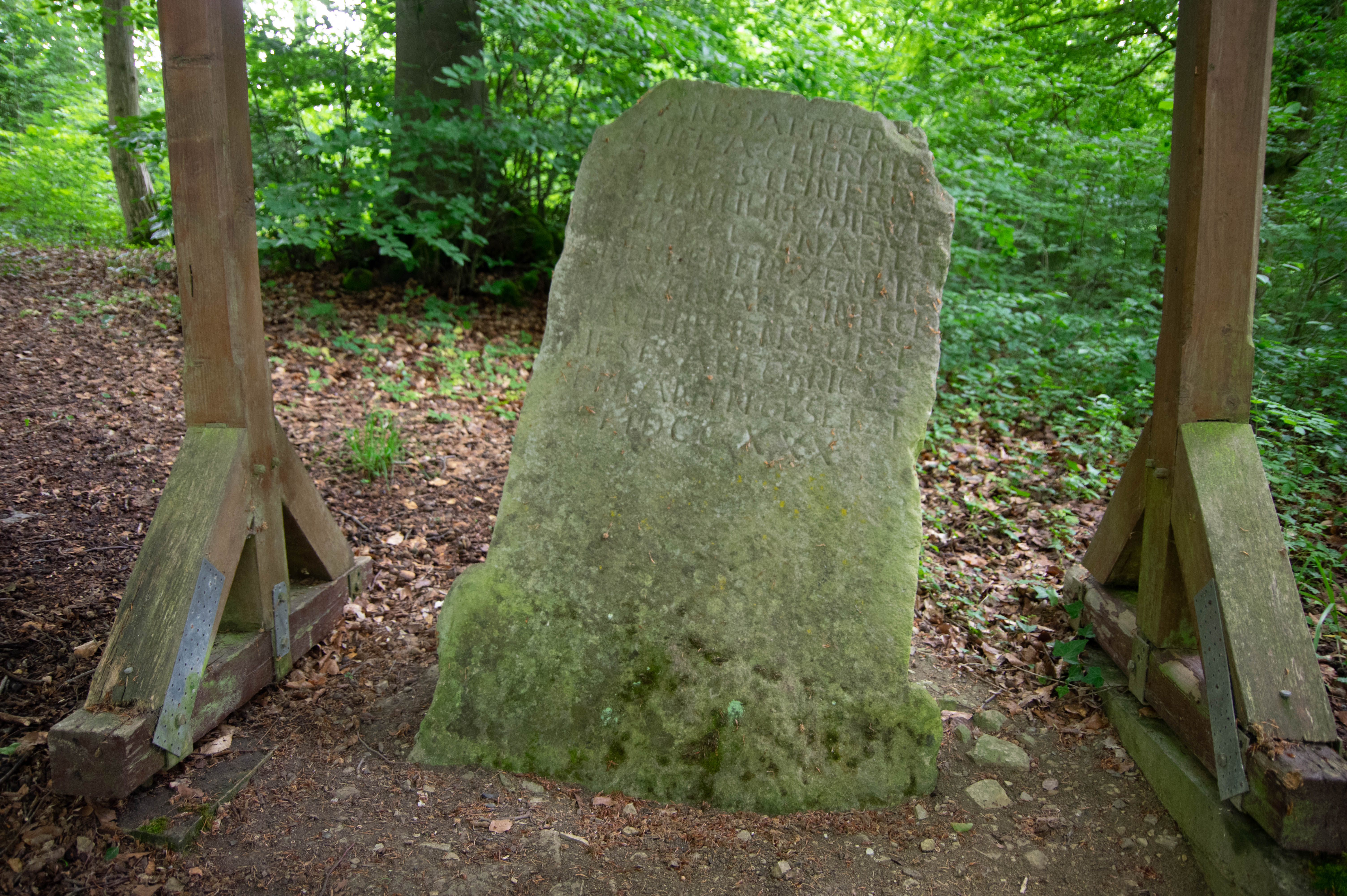 Einbeck, Ortsteil Brunsen in Niedersachsen.Der Weinstein ist ein Gedenkstein, der an einem Unfall im 15. Jahrhundert erinnert.